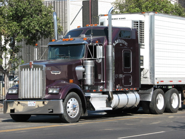 Kenworth Truck USA, Typ: KENWORTH W 900 L, Bj. ab 1989, Caterpillar oder Cummins Motor bis 600 PS. Quelle: Trucks Modelle aus der ganzen Welt. Parragon Books-Verlag ~2003 ISBN 978-1-40547-901-1